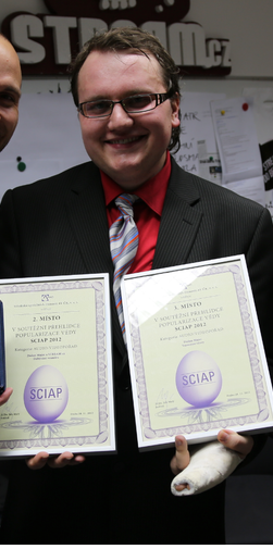 Dušan Majer s oceněním za popularizaci vědy